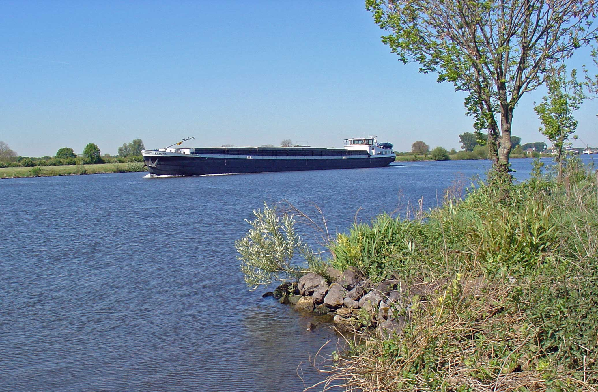 De Maas bij Afferden (River Meuse near Afferden)